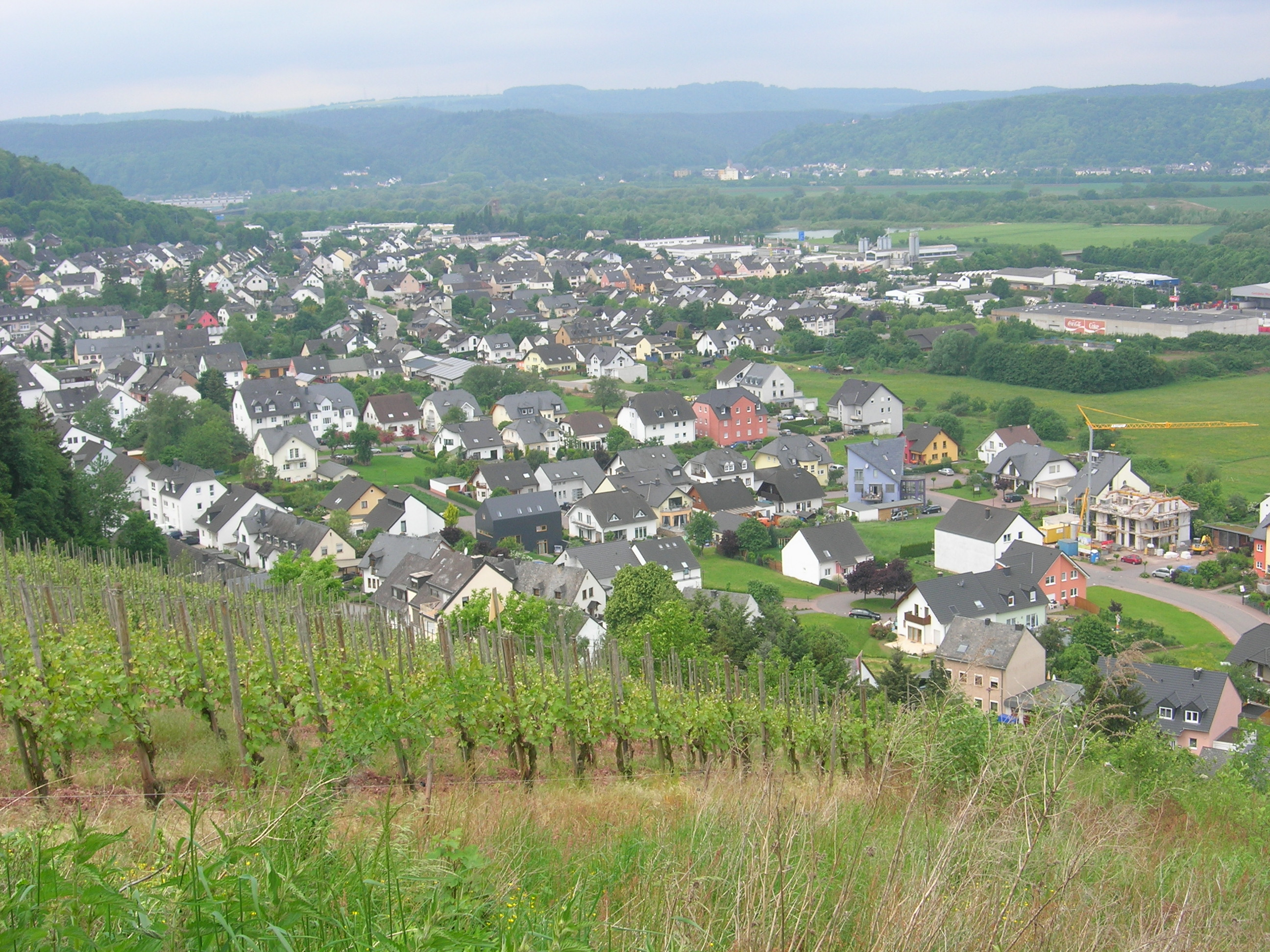 Ansicht der Ortsgemeinde Kenn aus Nordost